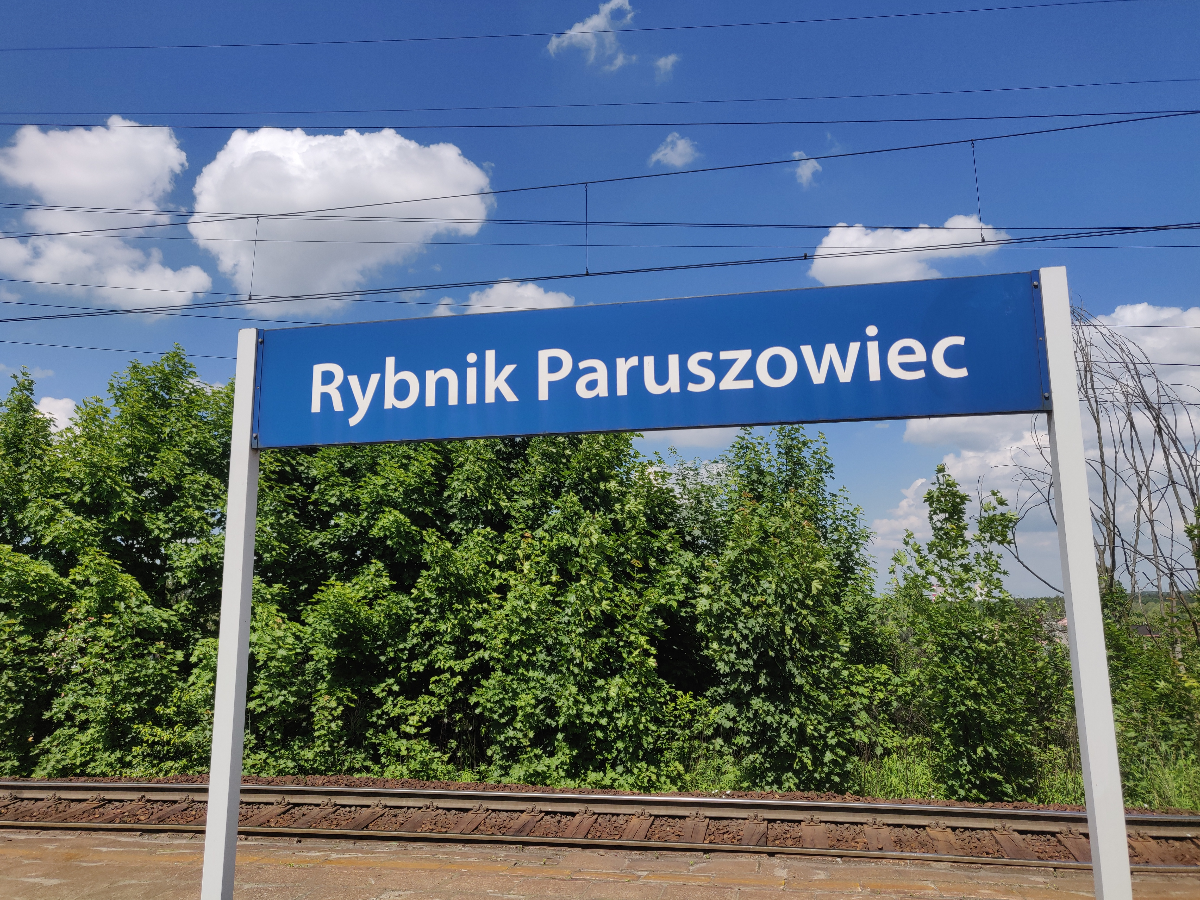 stacja kolejowa Rybnik Paruszowiec